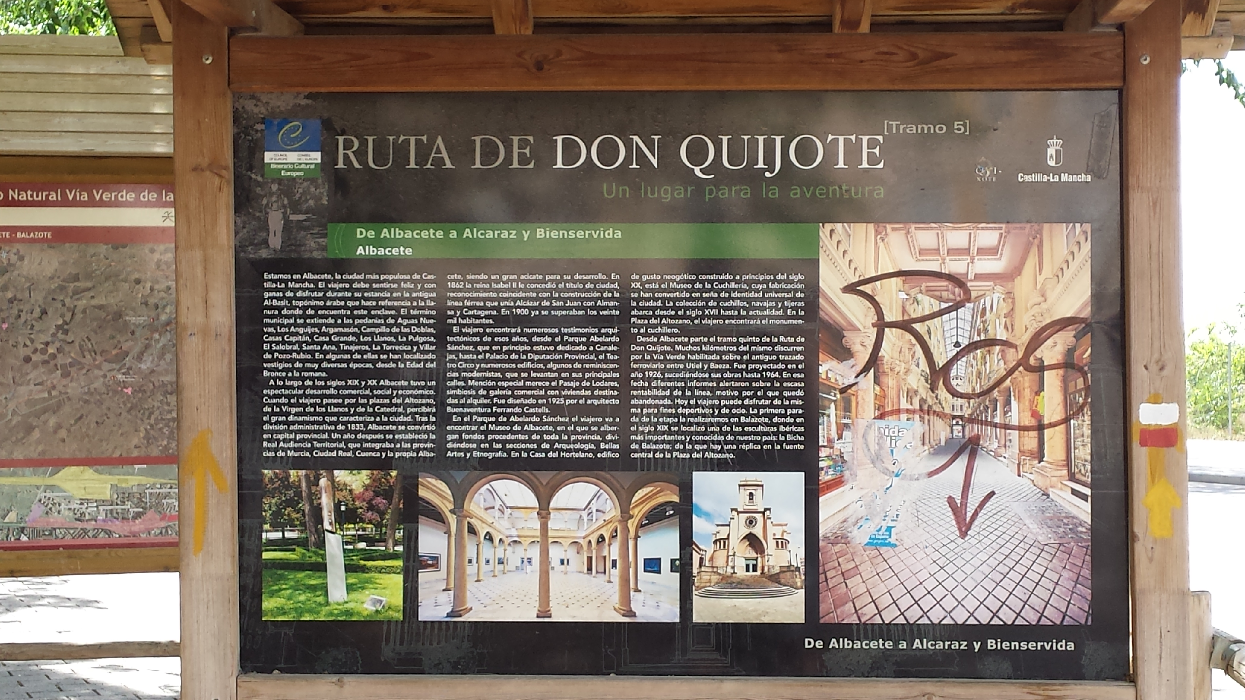 Ruta de Don Quijote. Parque de la Fiesta del Árbol. Calle Nuestra Señora de Montserrat. Albacete